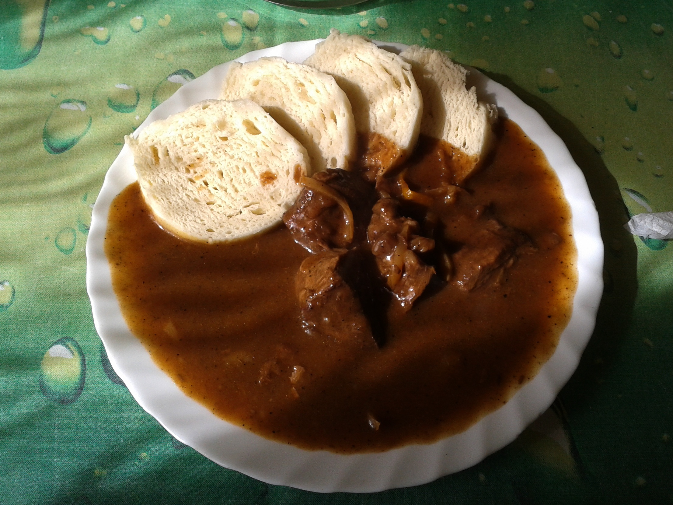 Maďarský guláš v obyčejné české hospodě